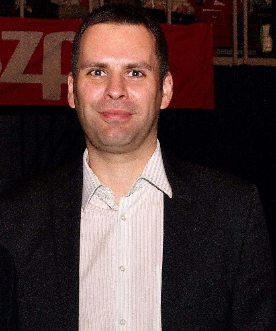 A DK delegációja az MSZP kongresszusán 2013. márciusban: Molnár Csaba